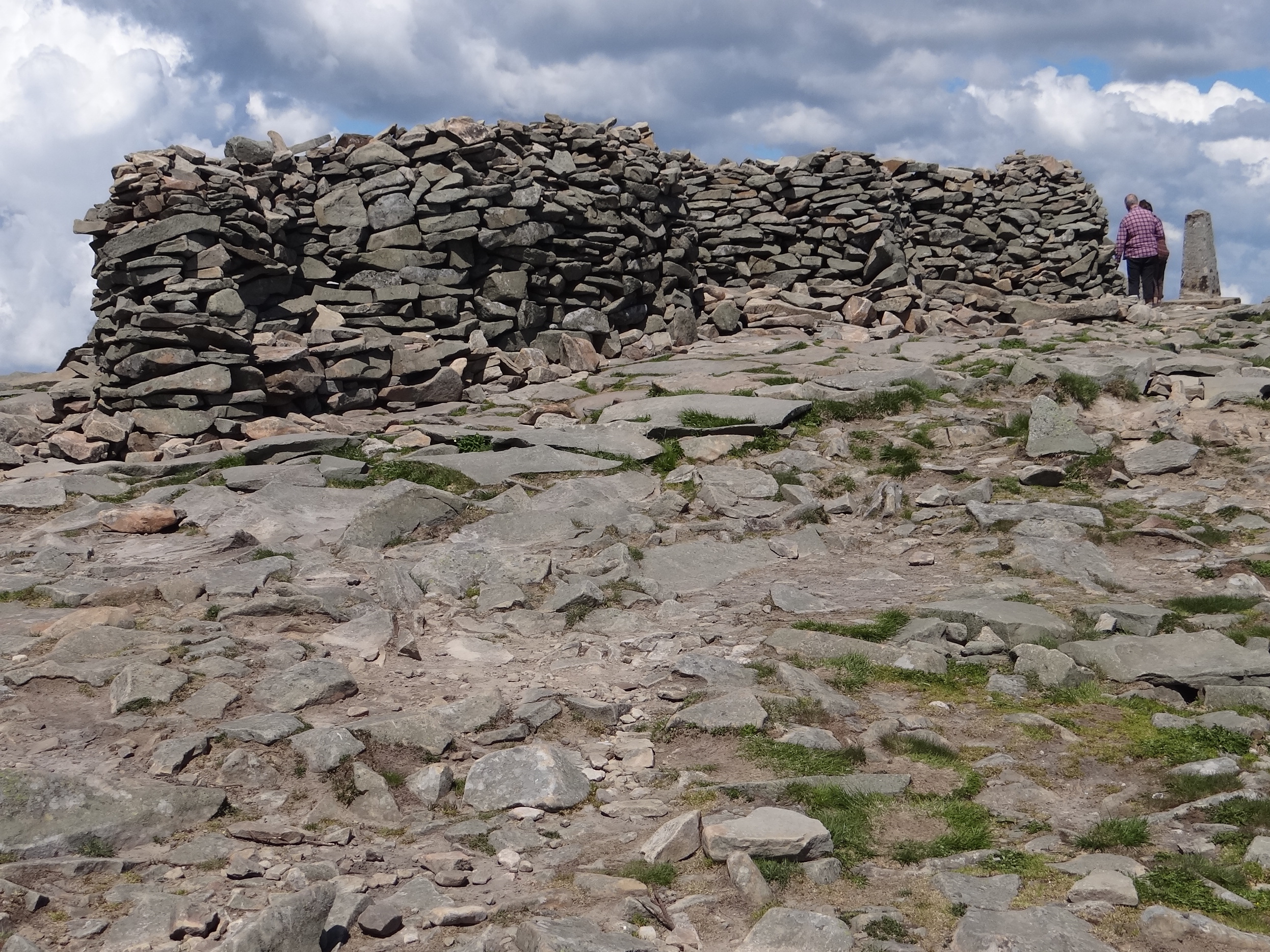 Kamienny mur na szczycie Babiej Gory